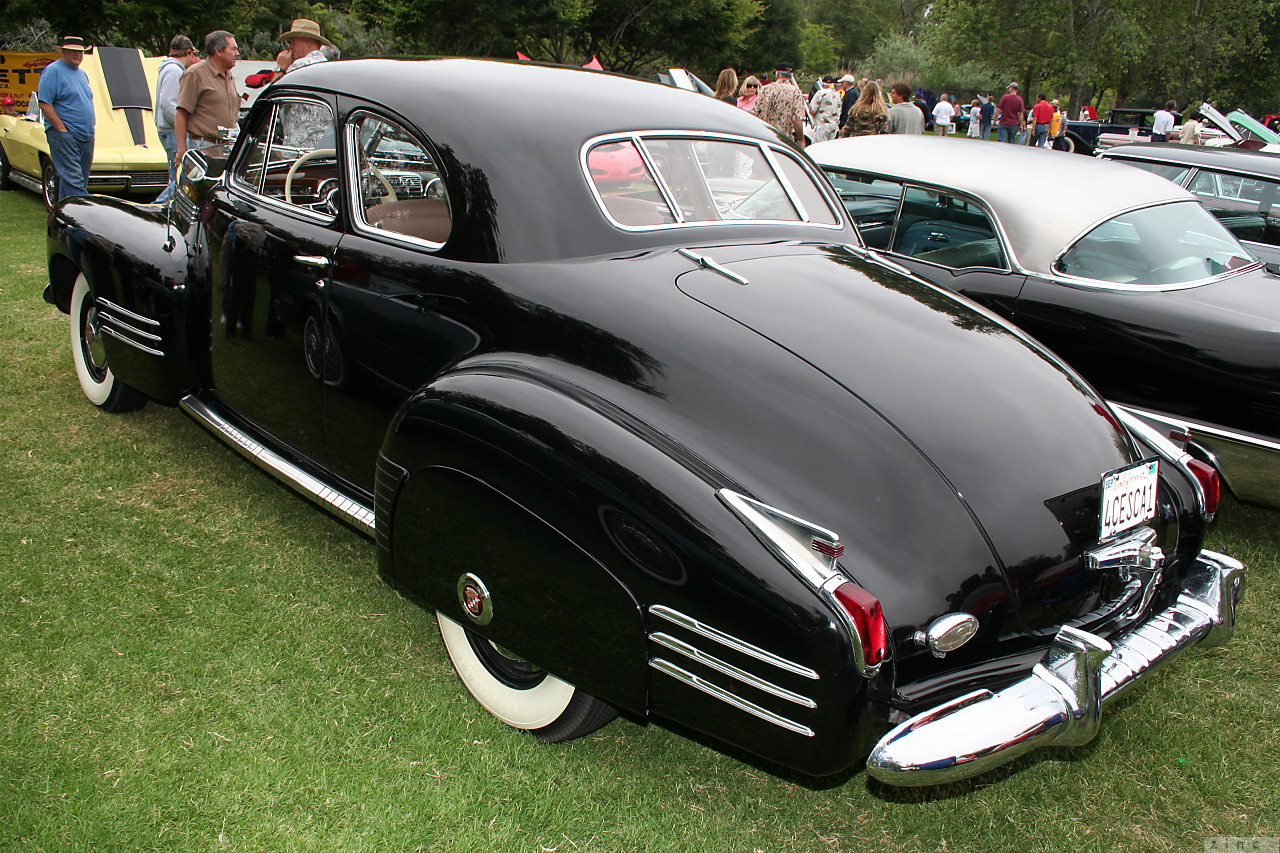 1941 Cadillac coupe